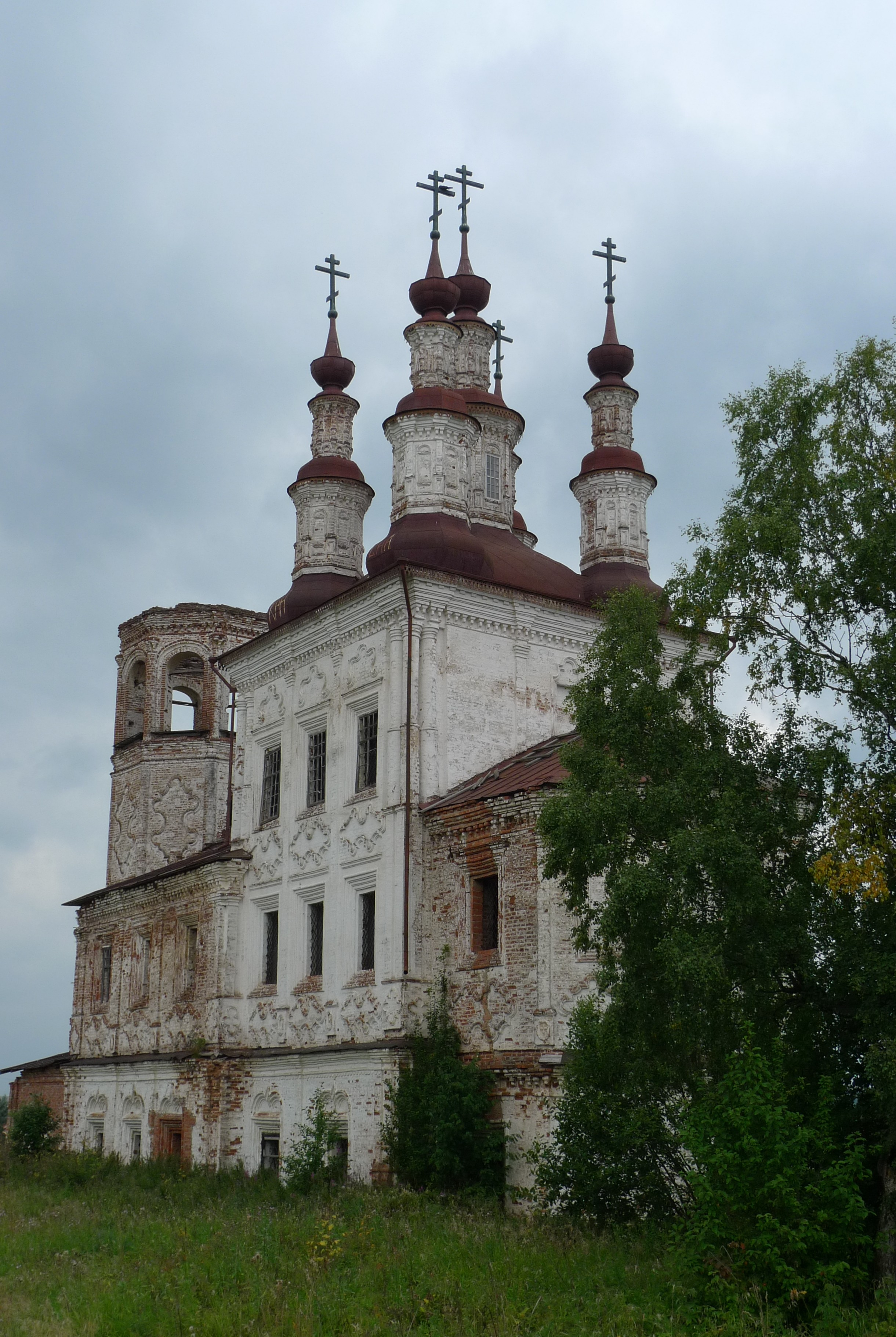 Церковь Воскресения Христова в Варницах (Вологодская область, Тотьма, село Варницы)